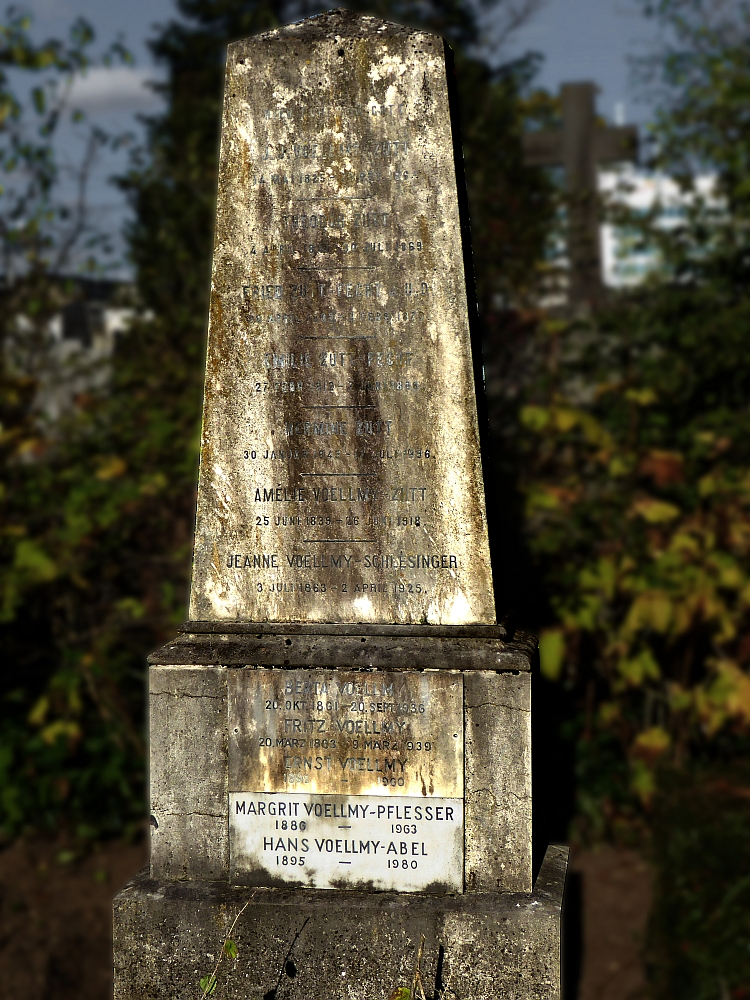 Fritz Voellmy (1863–1939) Maler, Grab auf dem Friedhof Wolfgottesacker, Basel